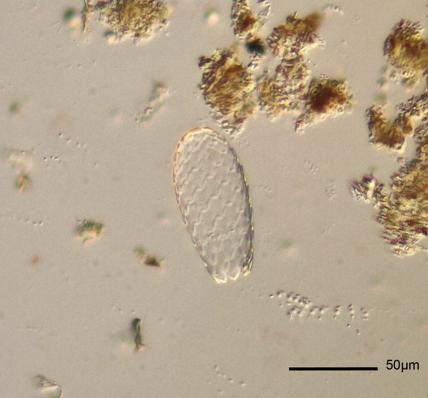 Euglypha tuberculata - Testate amoeba - 160x